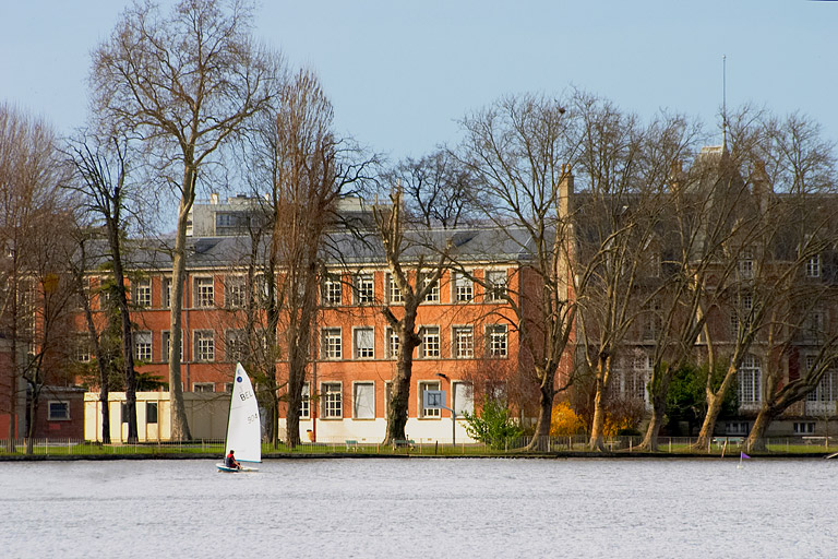 Lycée Gustave Monod, Enghien-les-Bains (Val d'Oise, France). Photo prise le 1 avril 2006.